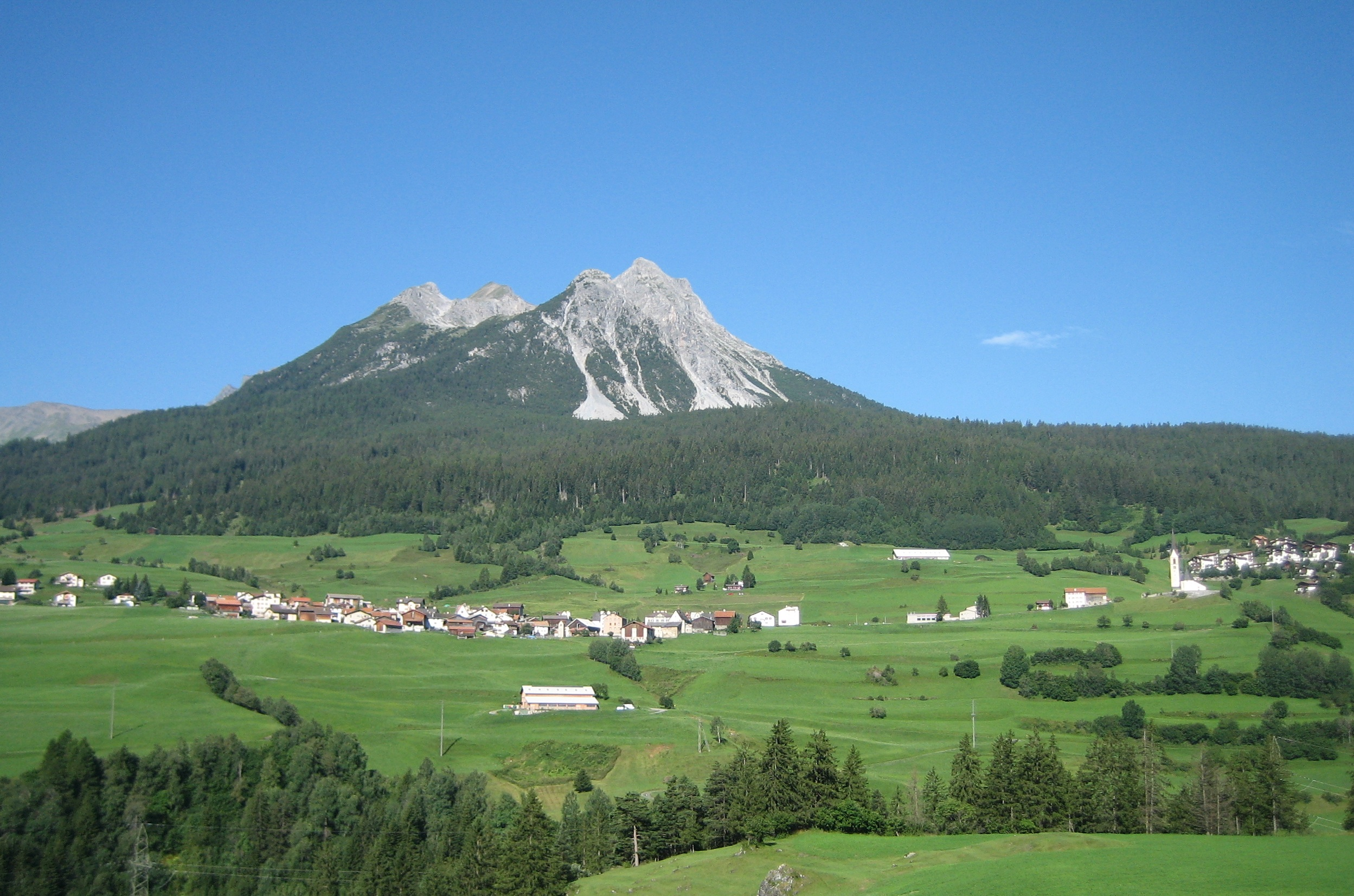 Salouf